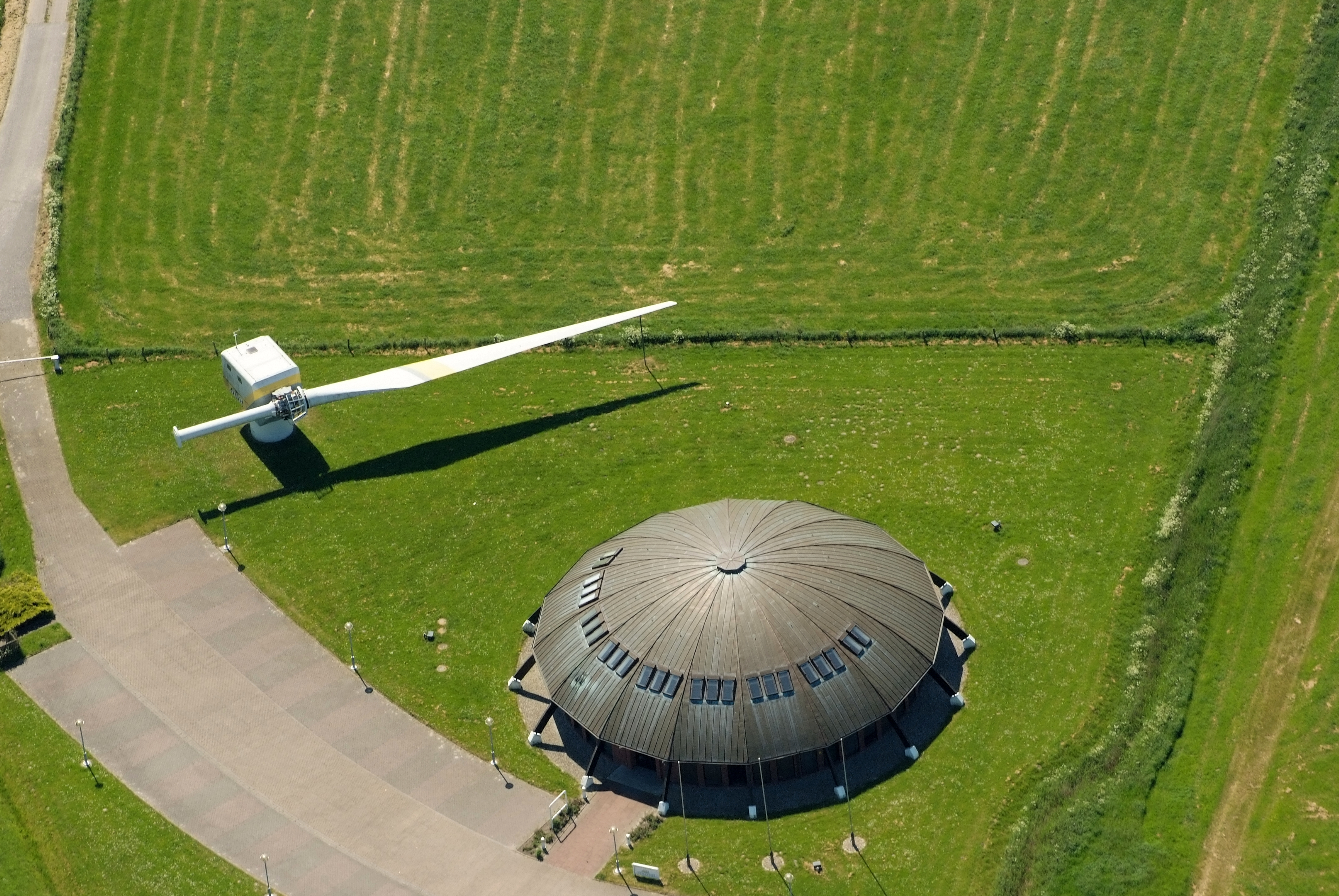 Ausgestellter Einflügler und ehemaliges Informationszentrum im Jade-Windpark bei Wilhelmshaven.